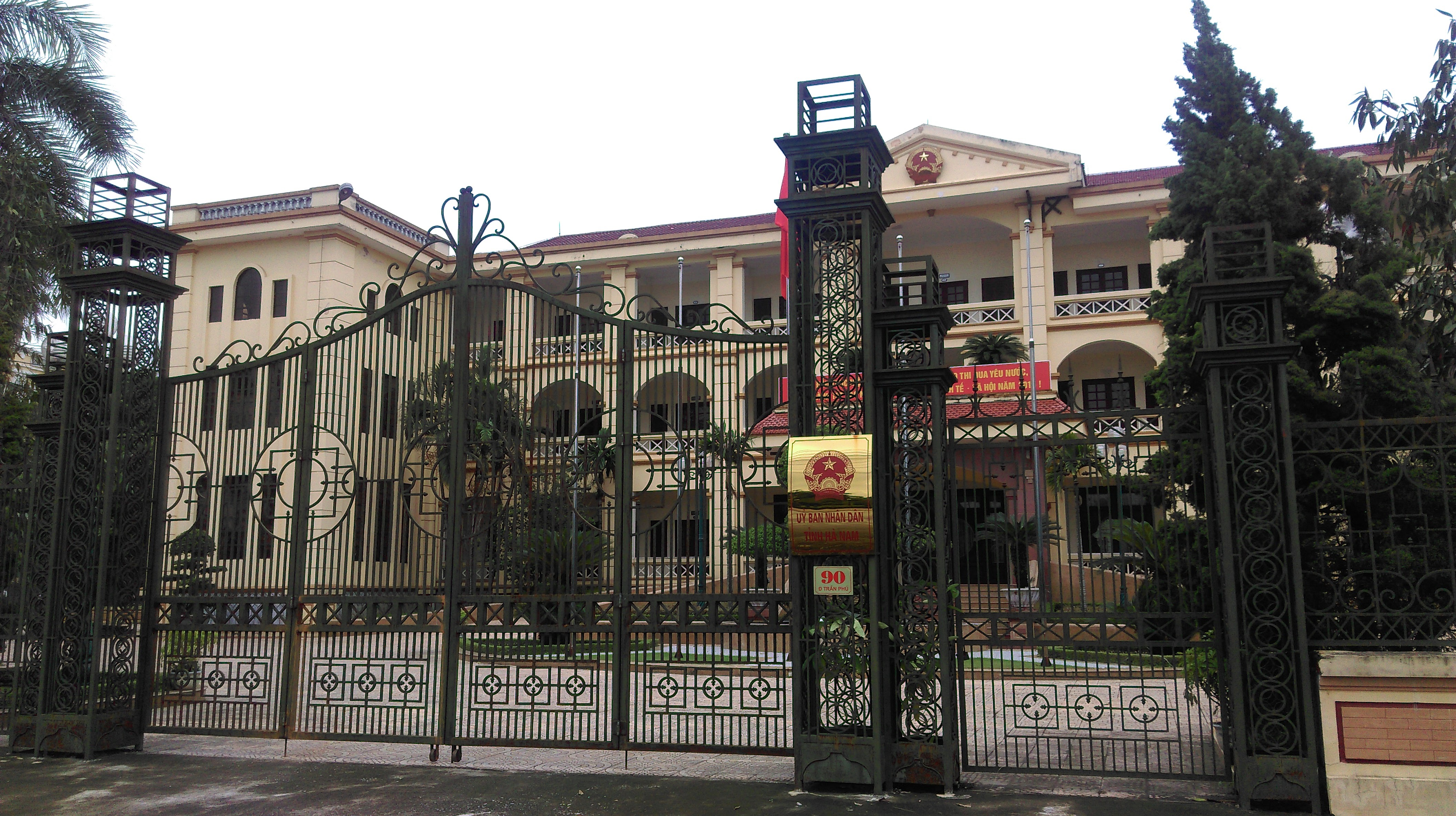 UBND tỉnh Hà Nam